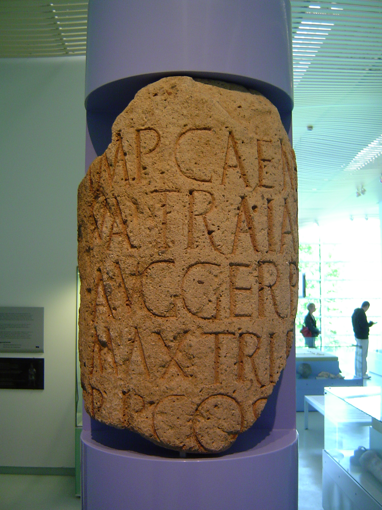 Roman milestone, Museum Het Valkhof Nijmegen, the Netherlands